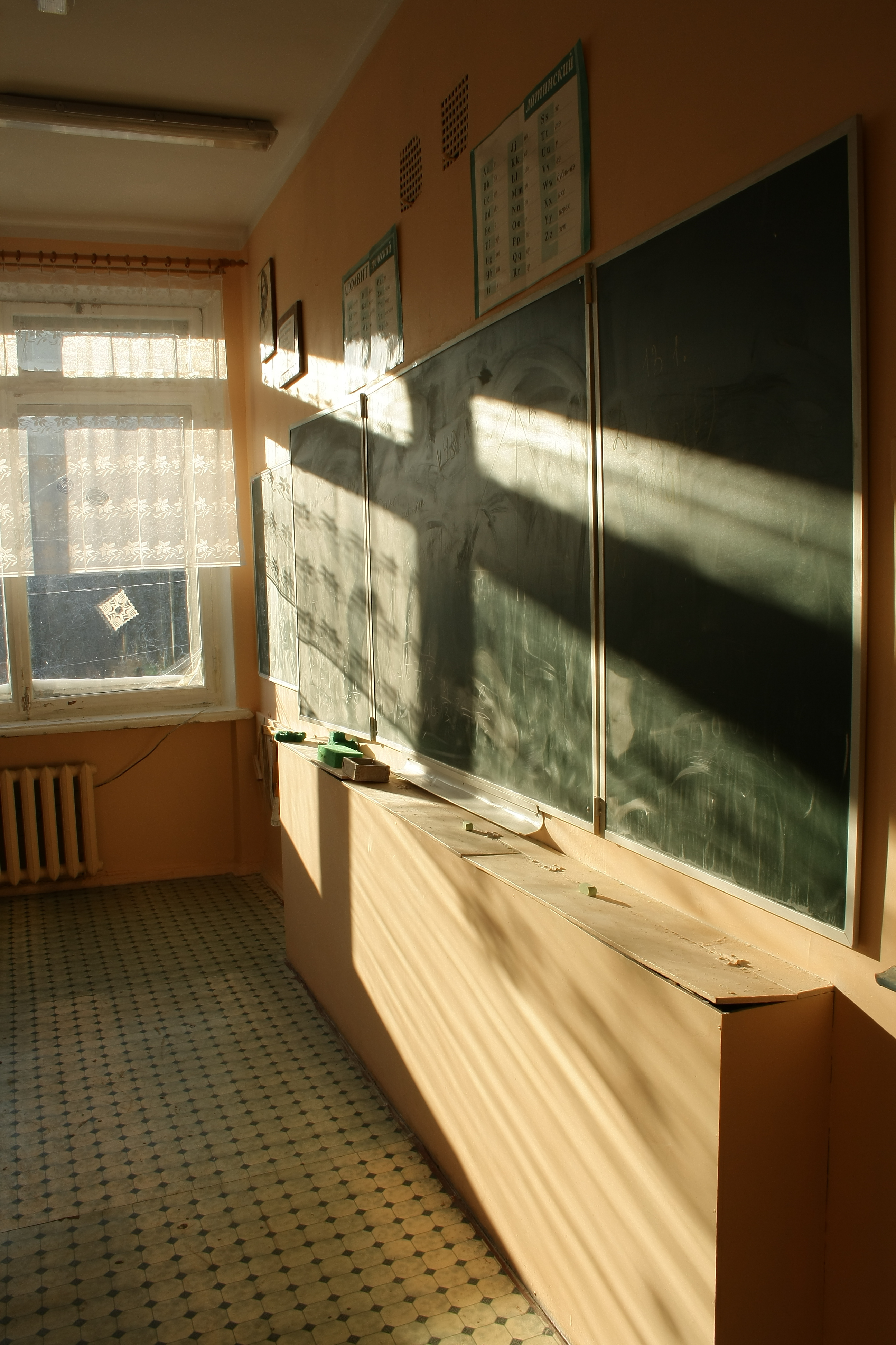 Доска кабинета математики в лучах зимнего солнца